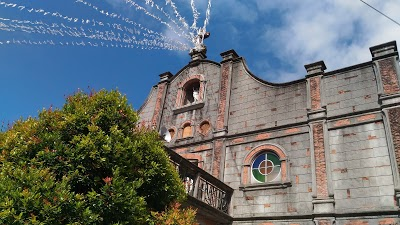 Parokya ni San Vicente Ferrer Lumampong Halayhay Indang Cavite